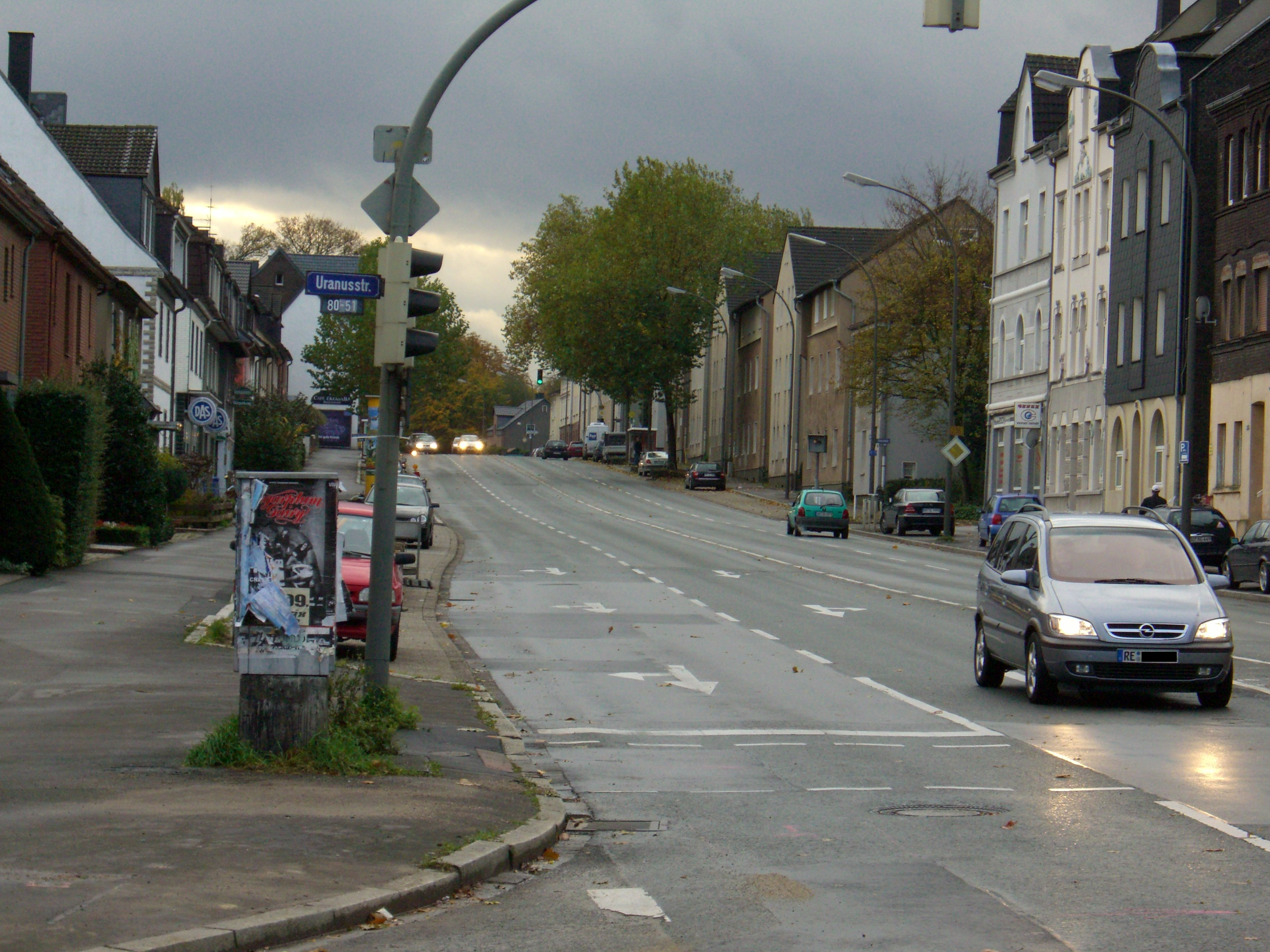 Dortmund-Bövinghausen, B 235